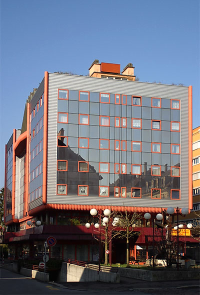 Le Locle, Hôtel "Les Trois Rois"